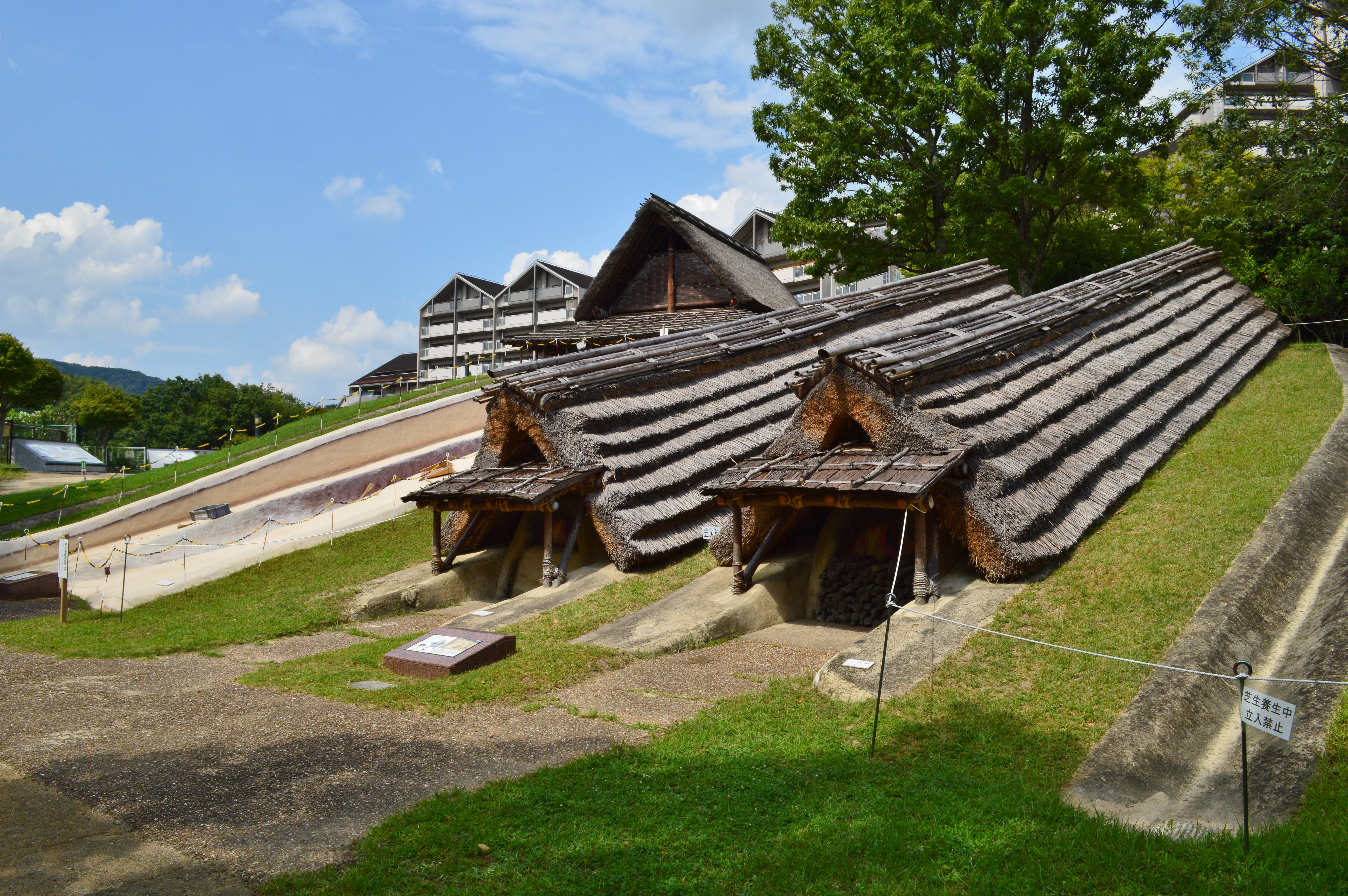 新池埴輪製作遺跡 1号・2号・3号窯（A群埴輪窯）